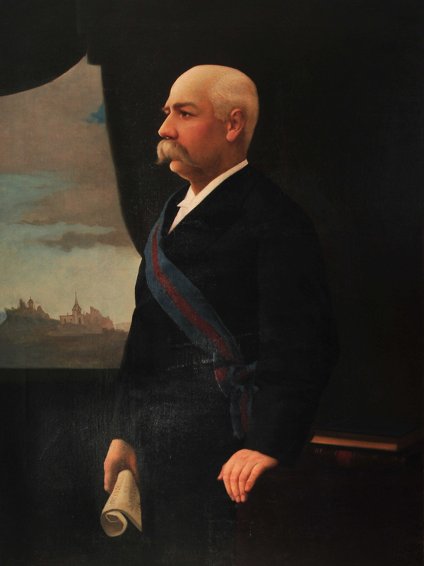 Benjamín Vicuña Mackenna (* Santiago, 25 de agosto de 1831 - † Santa Rosa de Colmo, 25 de enero de 1886) fue un destacado político e historiador chileno.